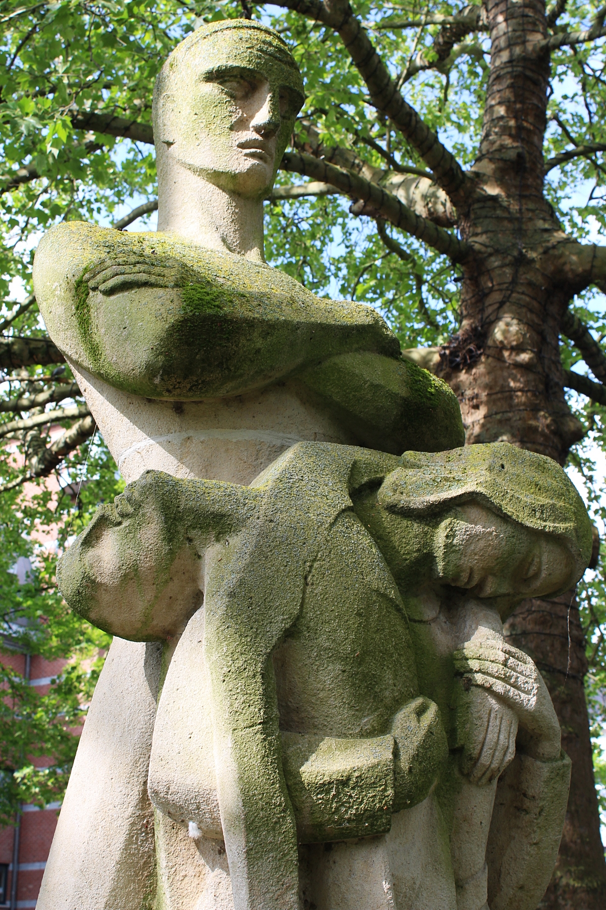 Nationaal Monument van de Nationale Koninklijke Beweging te Leuven. Beeldhouwer Willem De Backer. Groepsdetail.